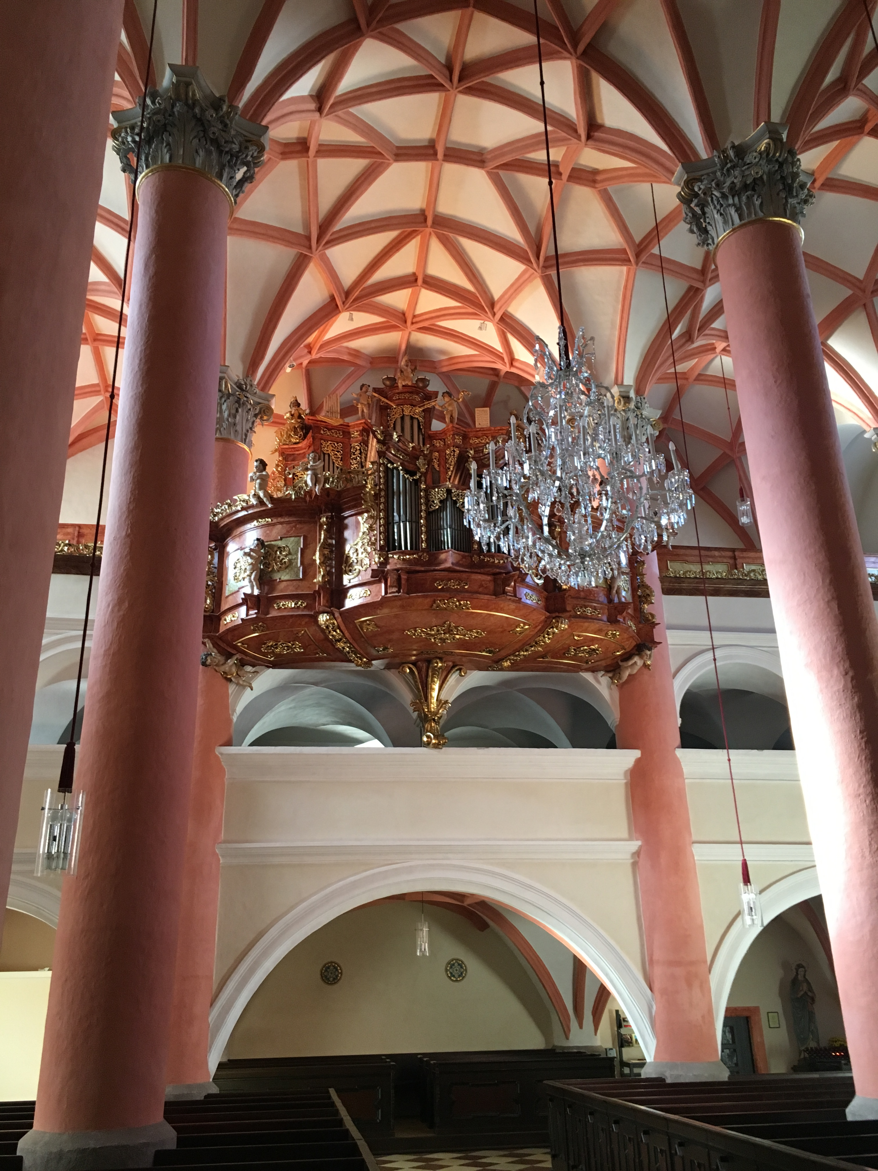 St Maria Magdalena Orgel